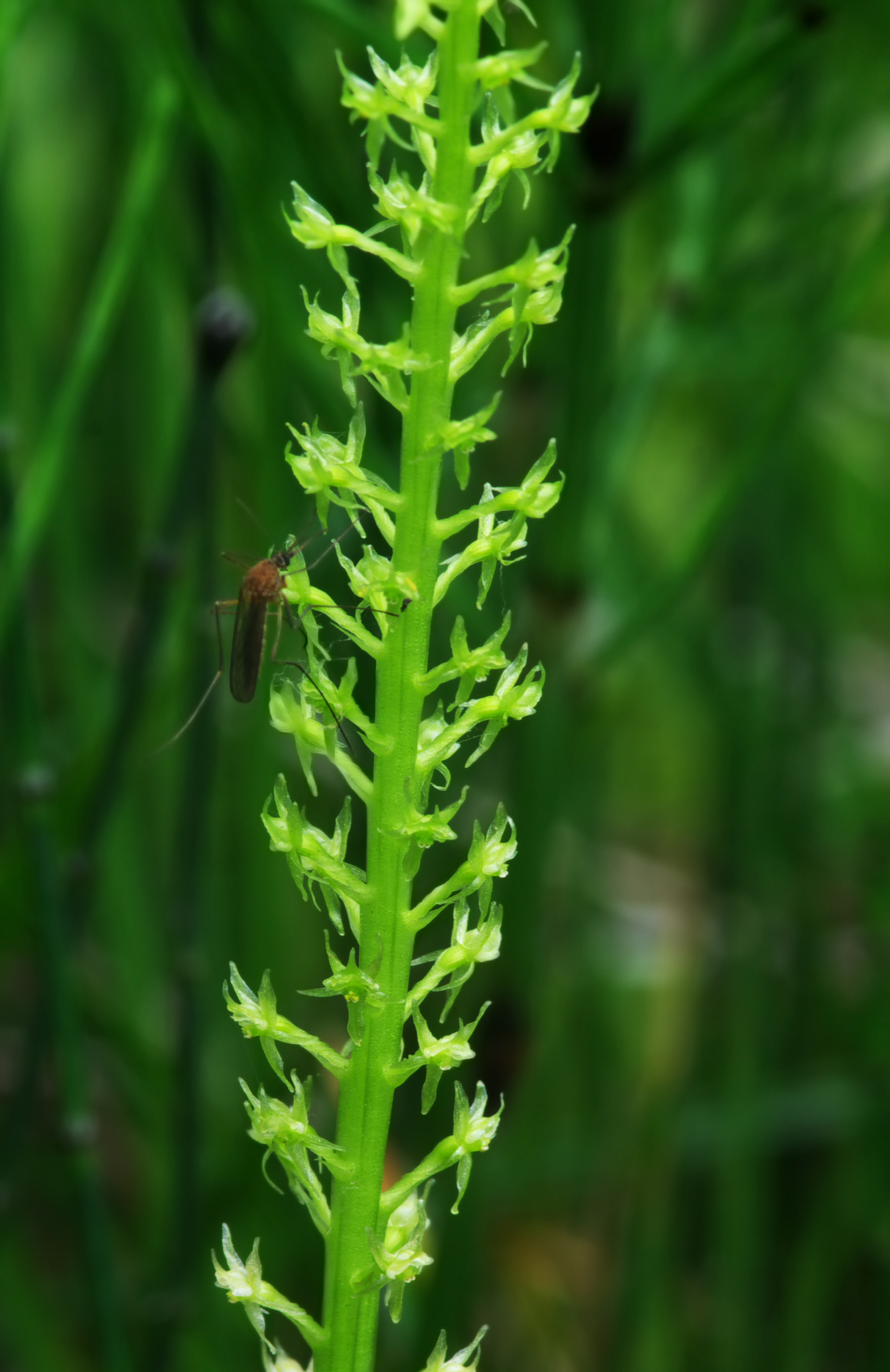 Wyblin jednolistny (Malaxis monophyllos) - Młaki nad Pogorią I w Dąbrowie Górniczej.